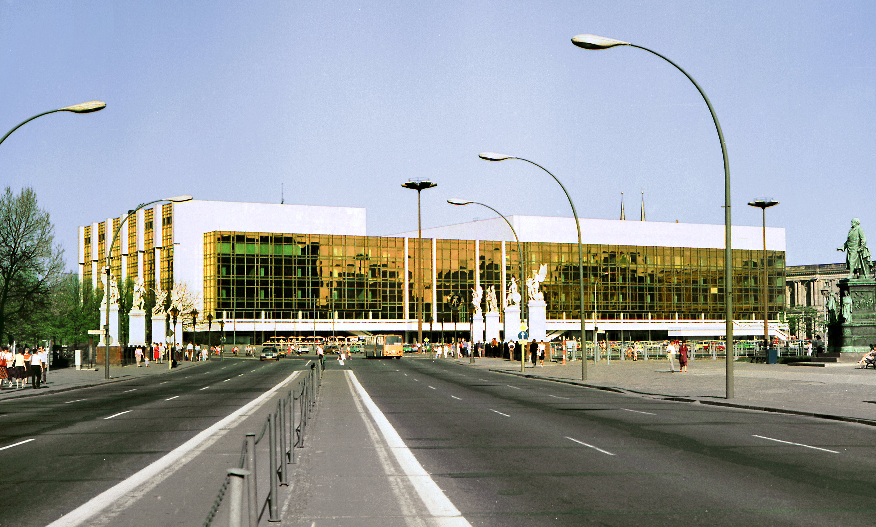 03.05.1986 DDR 1000 [10178] Berlin-Mitte, Marx-Engels-Platz: Palast der Republik (GMP: 52.517683,13.402373): 1973-1976 nach Entwürfen der Kollektive H. Graffunder, W. Eisentraut, Ch. Schulz, K.-E. Swora, M. Prasser und H. Aust. Gebäudekomplex von 85 x 180 m, etwa 480 000 m3 umbauter Raum. Kongreßsaal mit 5000, Sitzungssaal mit 700 Plätzen. Mehrere Gastronomische Einrichtungen mit insgesamt 1500 Plätzen. [R19860503B03.TIF]19860503400NR.JPG(c)Blobelt